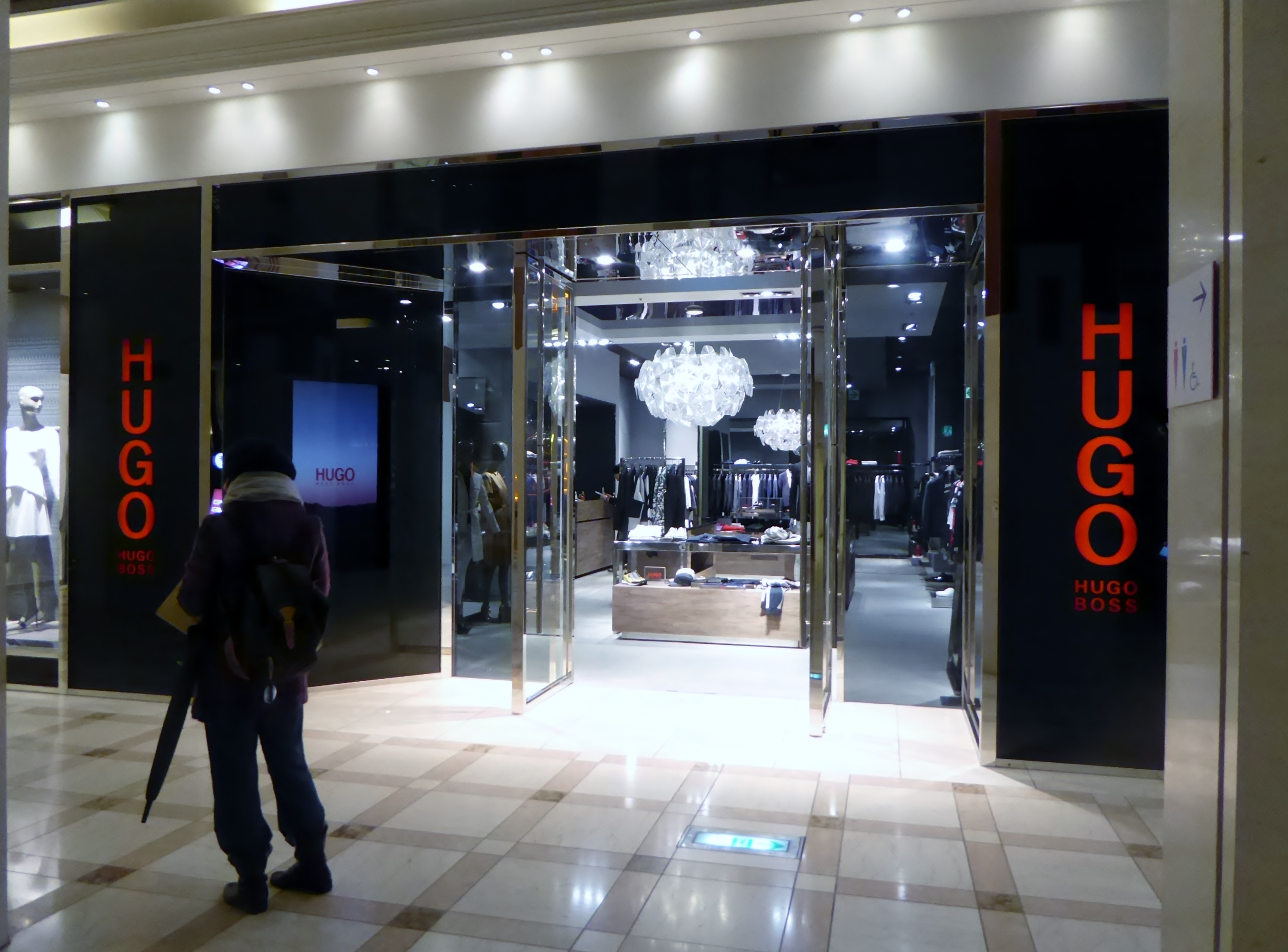 ヒューゴストアハービス大阪を撮影。